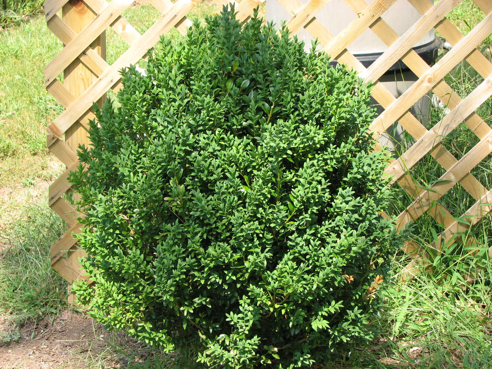 A box shrub.